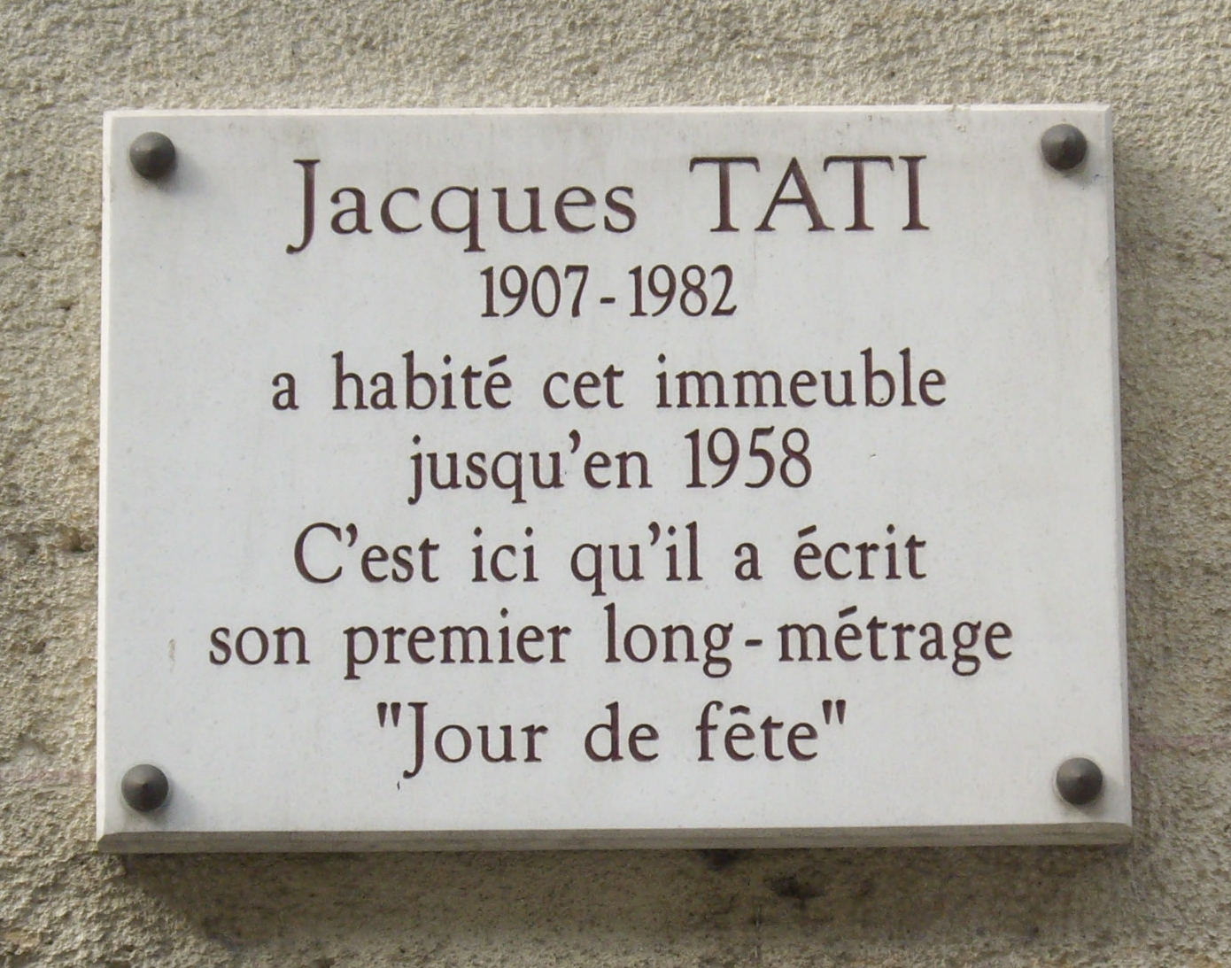 Plaque commémorative, 30 rue de Penthièvre, Paris 8e. « Jacques Tati, 1907-1982, a habité cet immeuble jusqu'en 1958. C'est ici qu'il a écrit son premier long-métrage, Jour de fête »